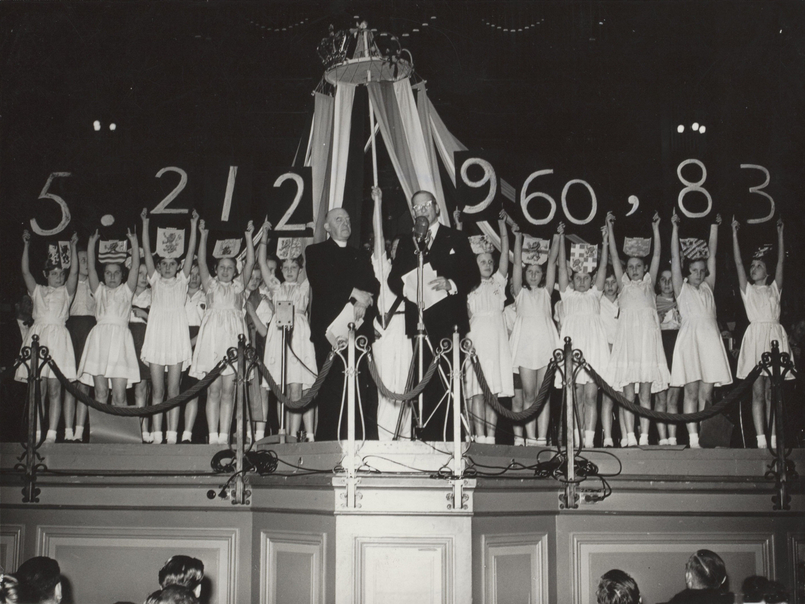 Collectie / Archief : Fotocollectie Elsevier Reportage / Serie : [ onbekend ] Beschrijving : Slotavond van [de omroepactie] "Beurzen open, dijken dicht" [ten behoeve van de slachtoffers van de Watersnoodramp], in het Concertgebouw te Amsterdam. De totaalopbrengst was fl. 5.212.960,83. Links prof. Kors en rechts staatsraad Schokking, vice-voorzitter van het Nationaal Rampenfonds die het bedrag in ontvangt neemt Datum : 28 maart 1953 Locatie : Amsterdam, Noord-Holland Trefwoorden : acties, hulpverlening, omroepen, radio, rampen Persoonsnaam : Kors Fotograaf : Bilsen, Joop van / Anefo Auteursrechthebbende : Nationaal Archief Materiaalsoort : Foto (zwart/wit) Nummer archiefinventaris : bekijk toegang 2.24.05.02 Bestanddeelnummer : 059-1127